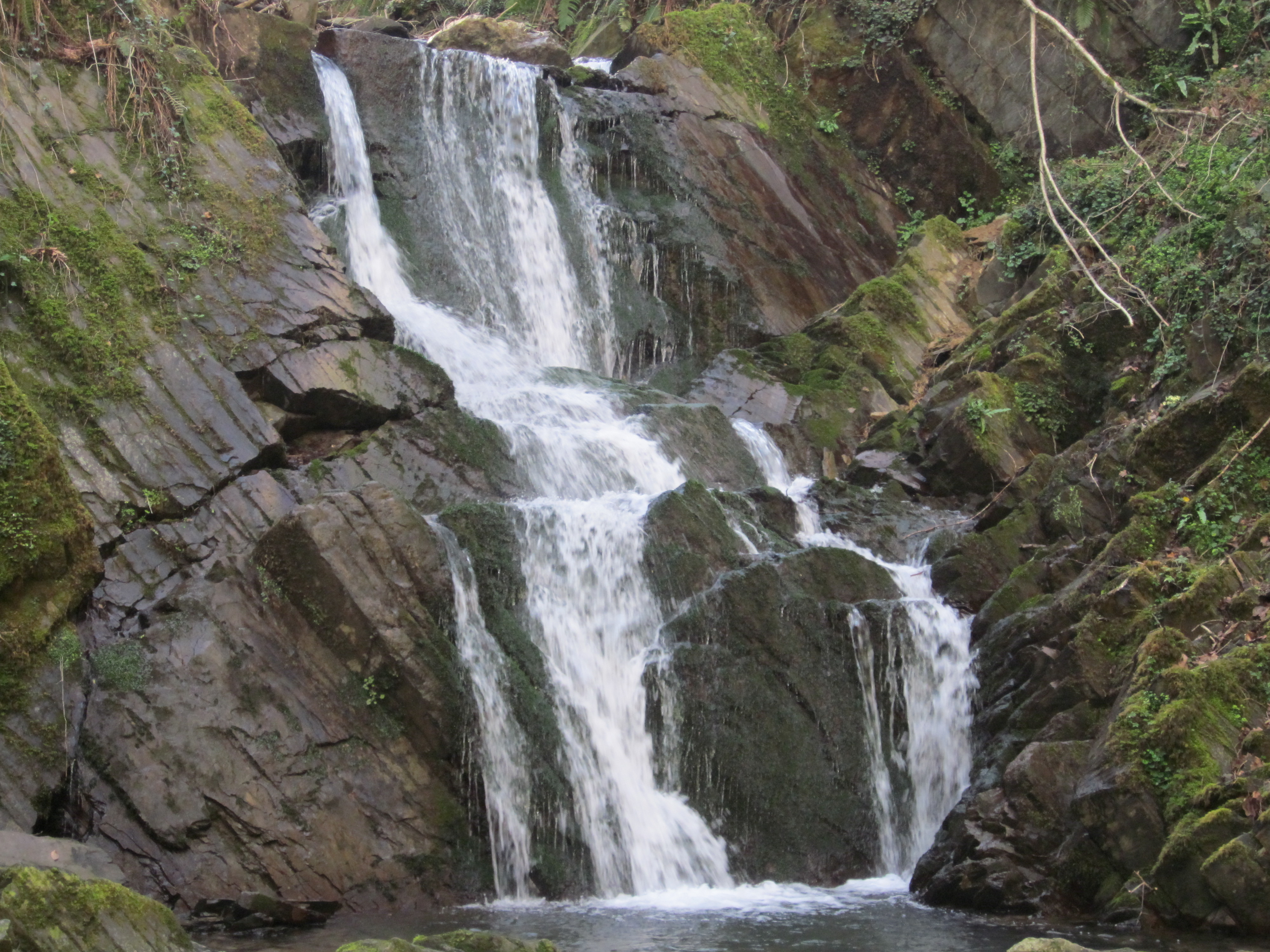 chute de Sastarrain